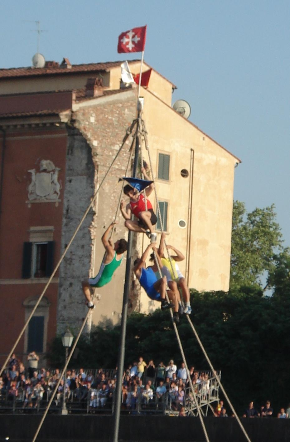 I quattro montatori dei quartieri storici di Pisa si arrampicano sul pennone alto 10 metri del traguardo per recuperare il paliotto azzurro della vittoria. 17 giugno 2009, Palio di San Ranieri, Pisa.